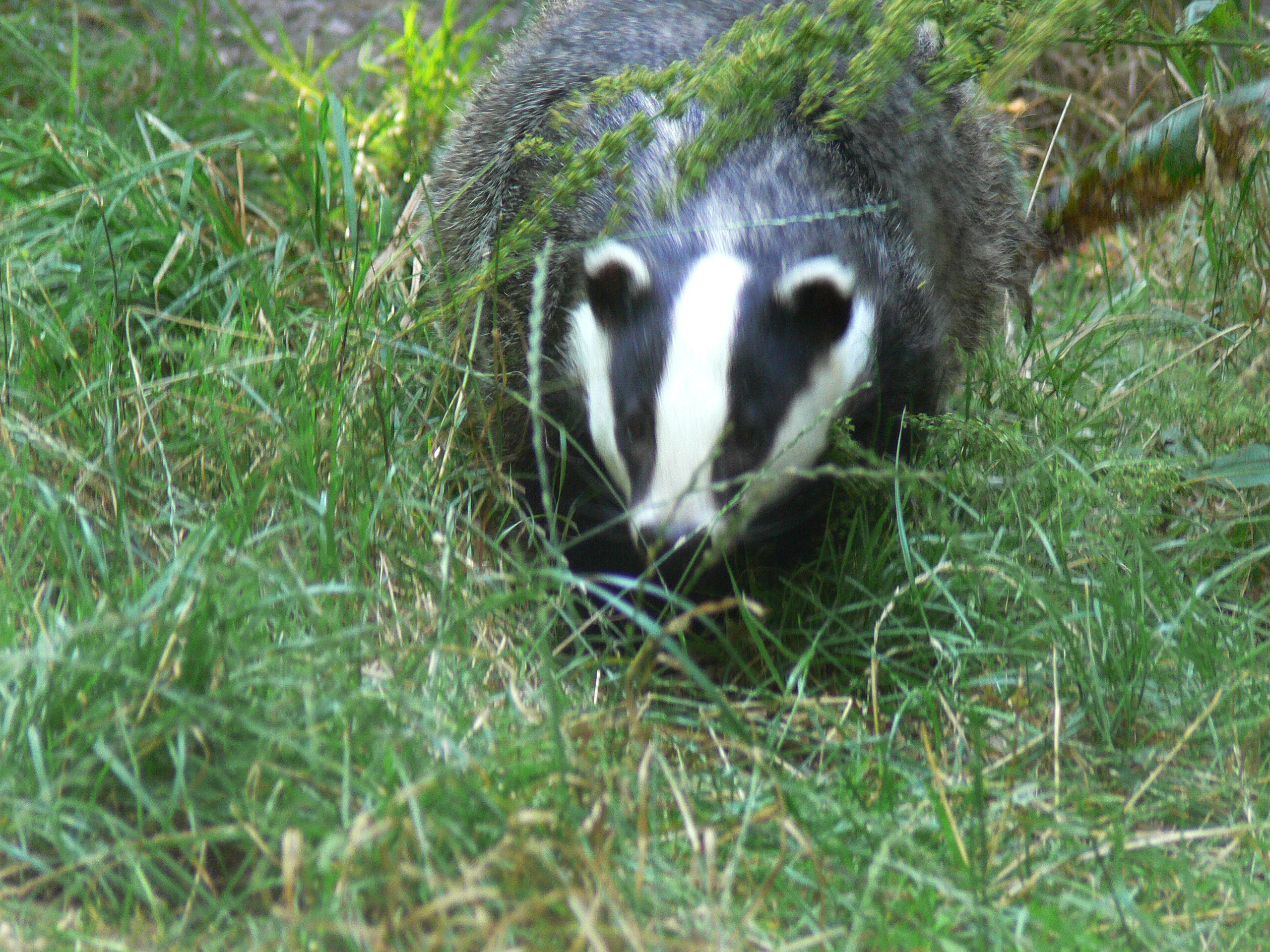 blaireau Parc de découverte de Wildwood